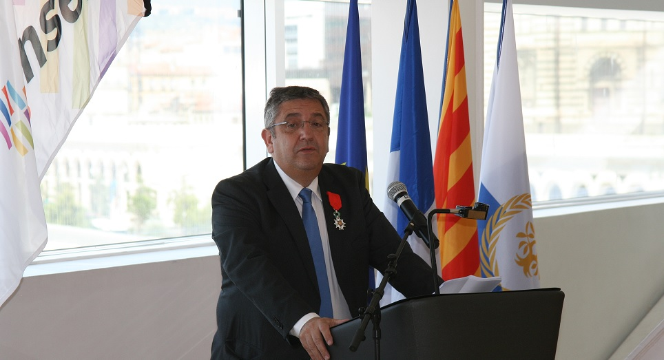 Marc Savasta, Remise du titre de Chevalier de la legion d'honneur à Marseille 2015